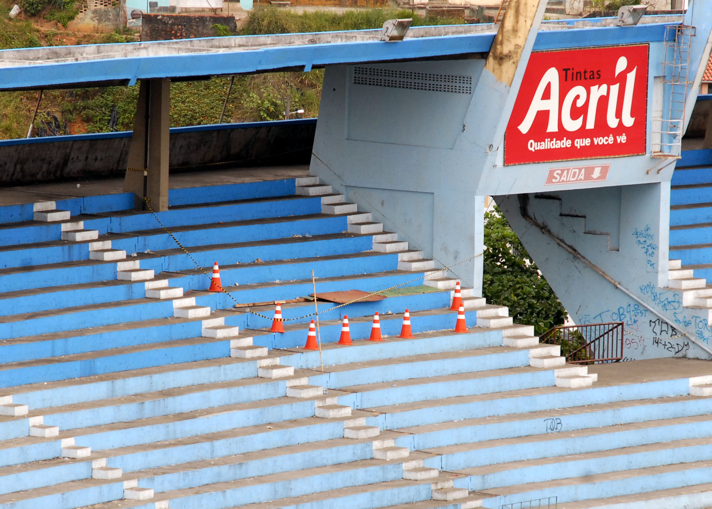 Salvador - Buraco da arquibancada do Estádio da Fonte Nova fechado com tábuas. No último domingo (25) parte da arquibancada do estádio cedeu e sete pessoas morreram.